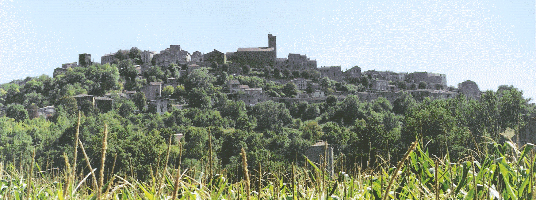 Photo de Cordes-sur-Ciel (France, Tarn) prise de la vallée.